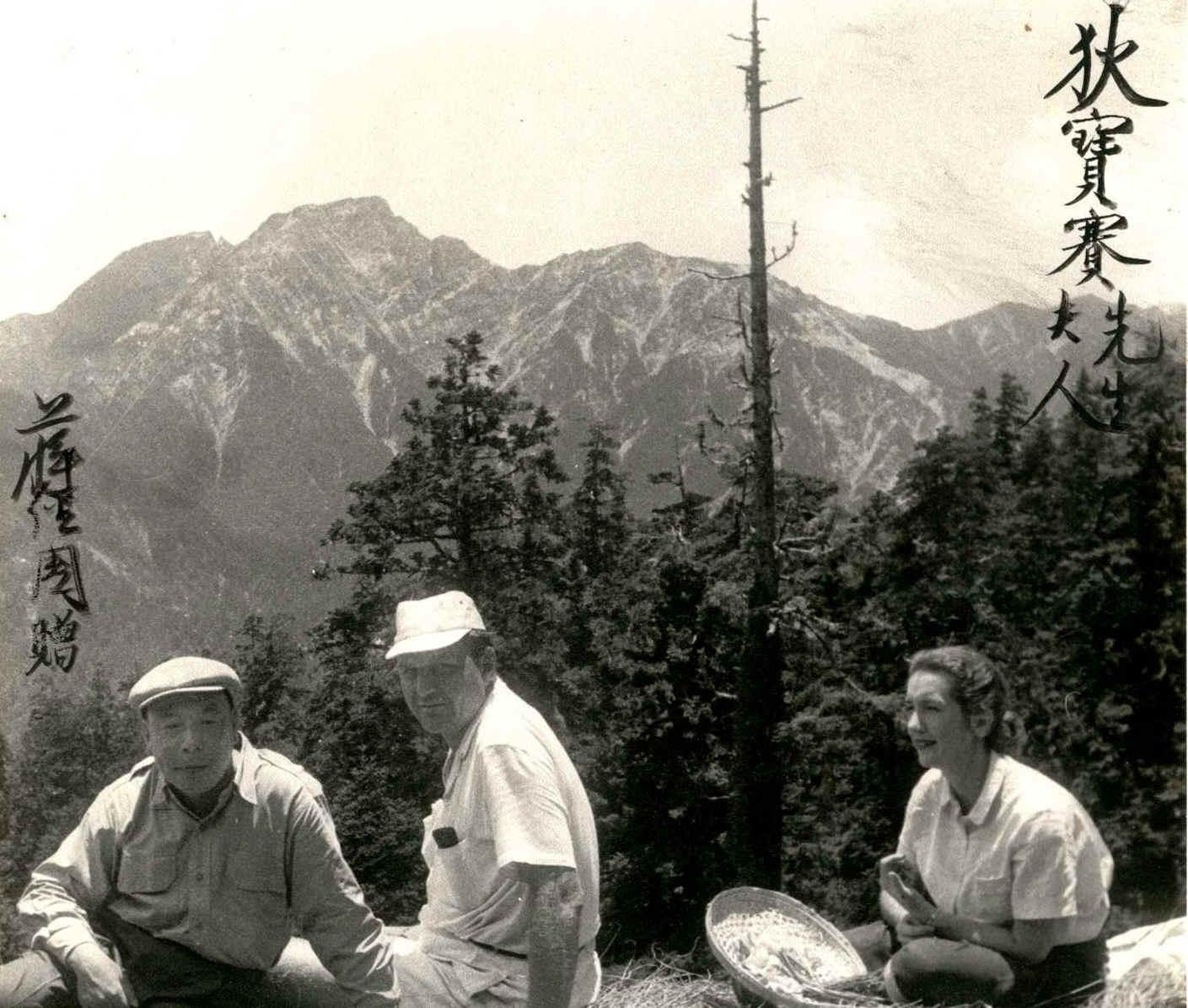 行政院國軍退除役官兵就業輔導委員會主任委員蔣經國與狄寶賽夫婦在踏勘中部橫貫公路途中休息。